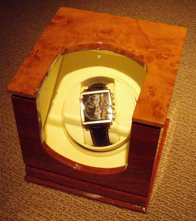 TagHeuer Monaco in watch winder